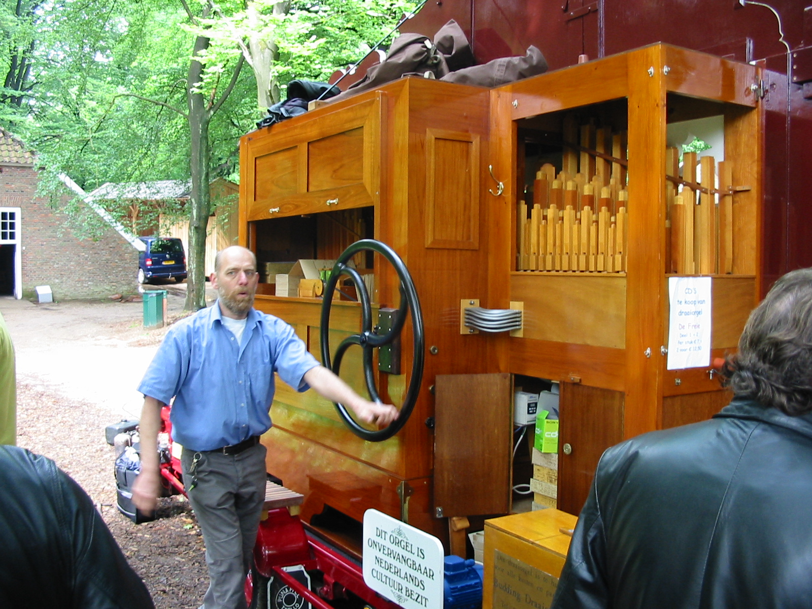 Het met de hand draaien van een straatdraaiorgel in het Openluchtmuseum te Arnhem op zondag 21 mei 2006.